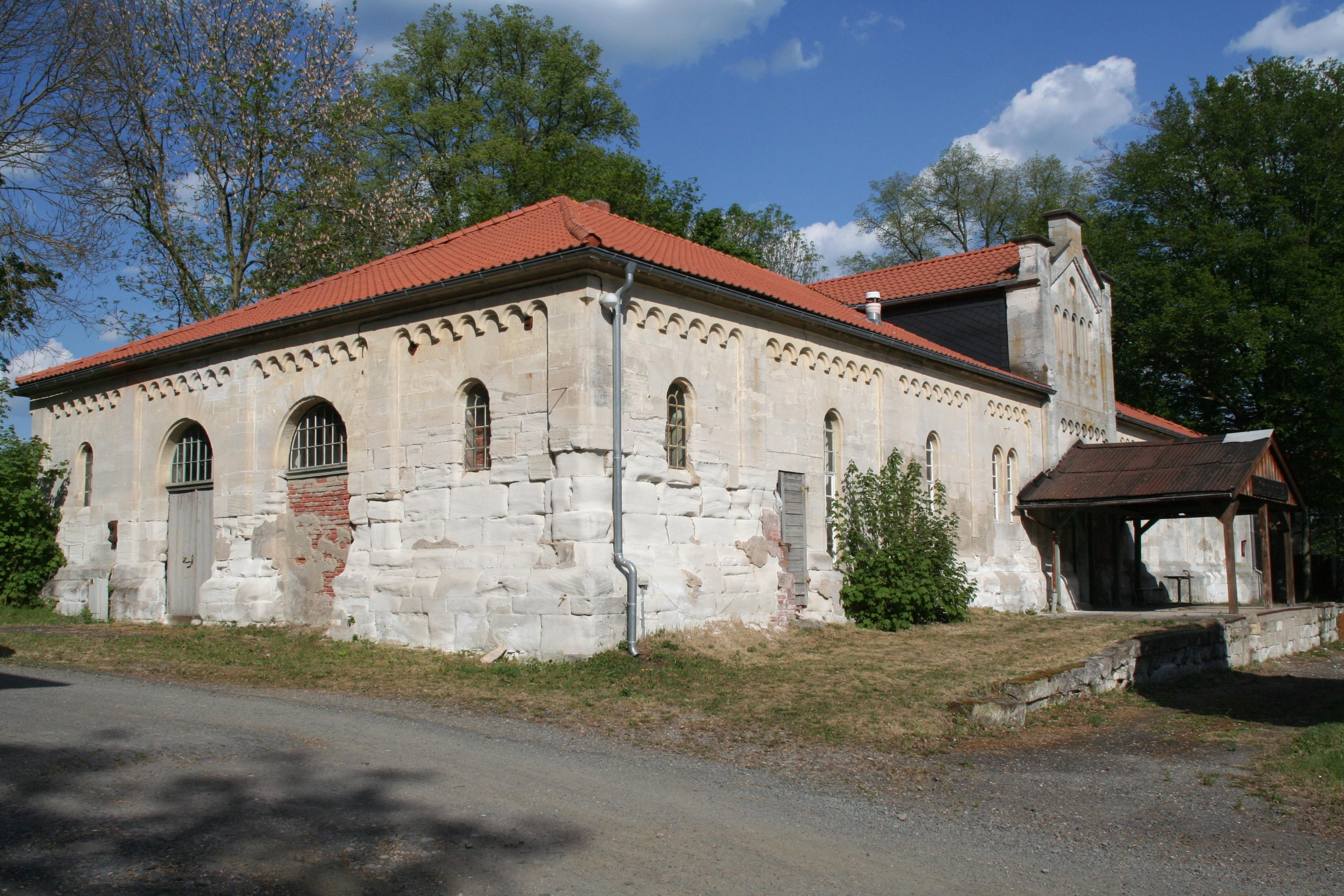 Lindenau Saline Friedrichshall, Verladerampe in Heldburg, Landkreis Hildburghausen